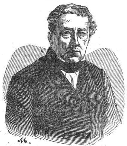 Deville